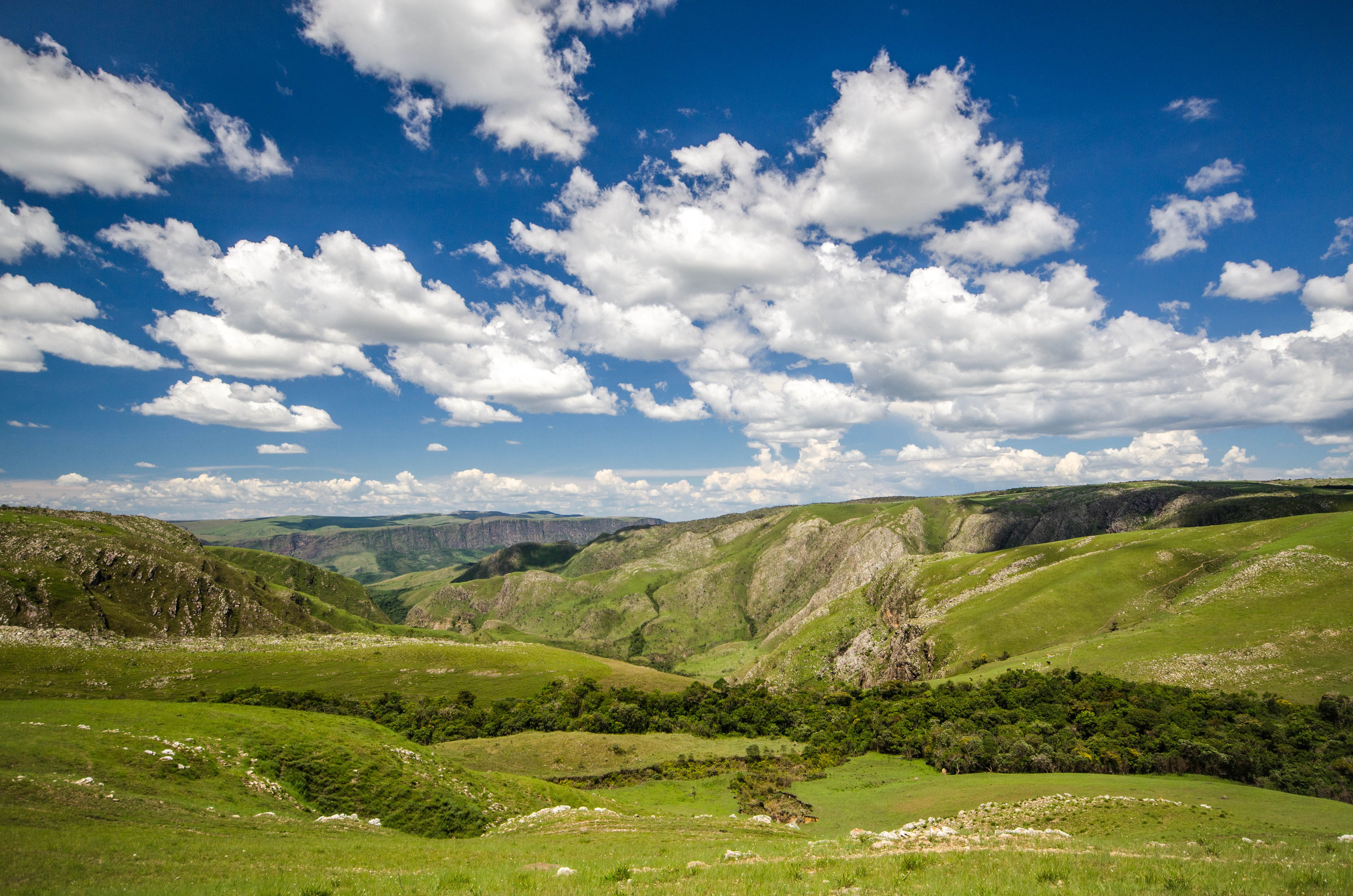 Vista do alto da Serra da Canastra/MG.